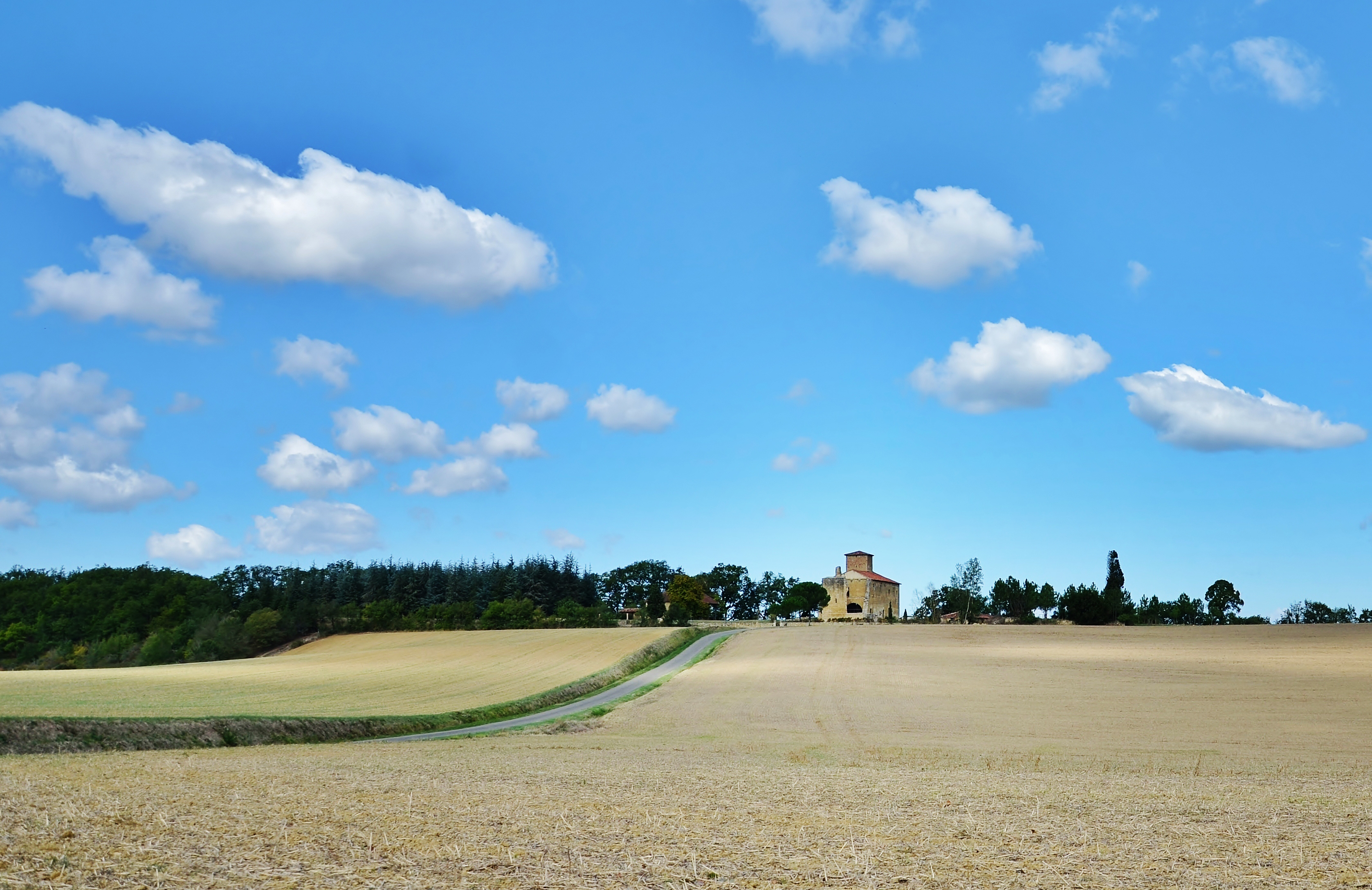 Château du Garrané, (Classement, 1978) .